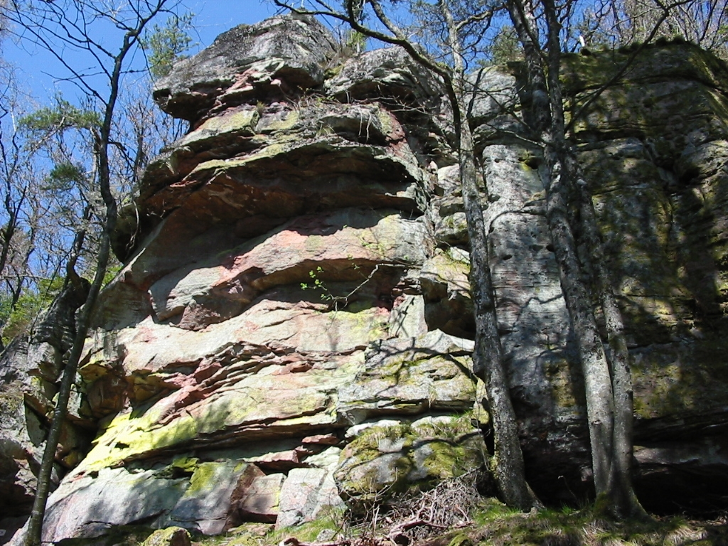 La roche d'Anozel vue de sa base, massif du Kemberg, près de Saint-Dié-des-Vosges